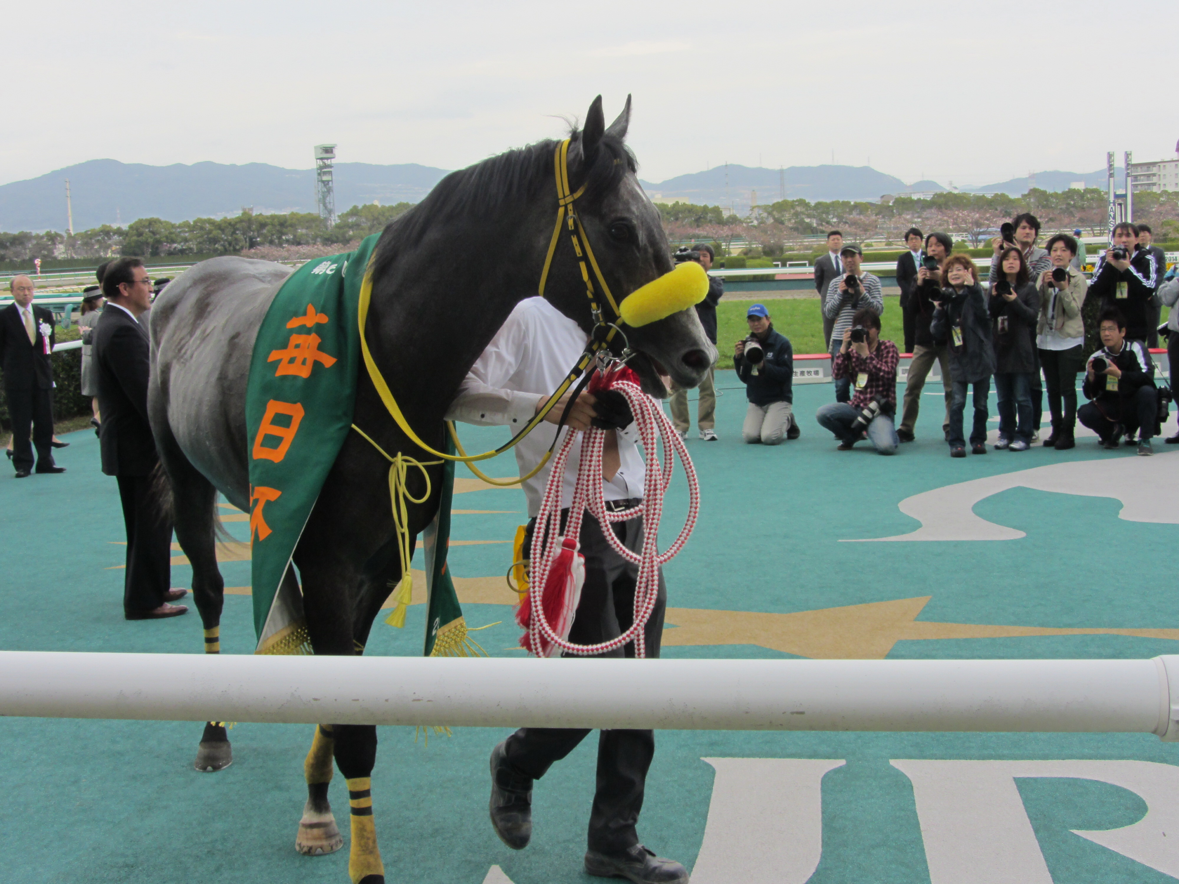 2014年毎日杯優勝